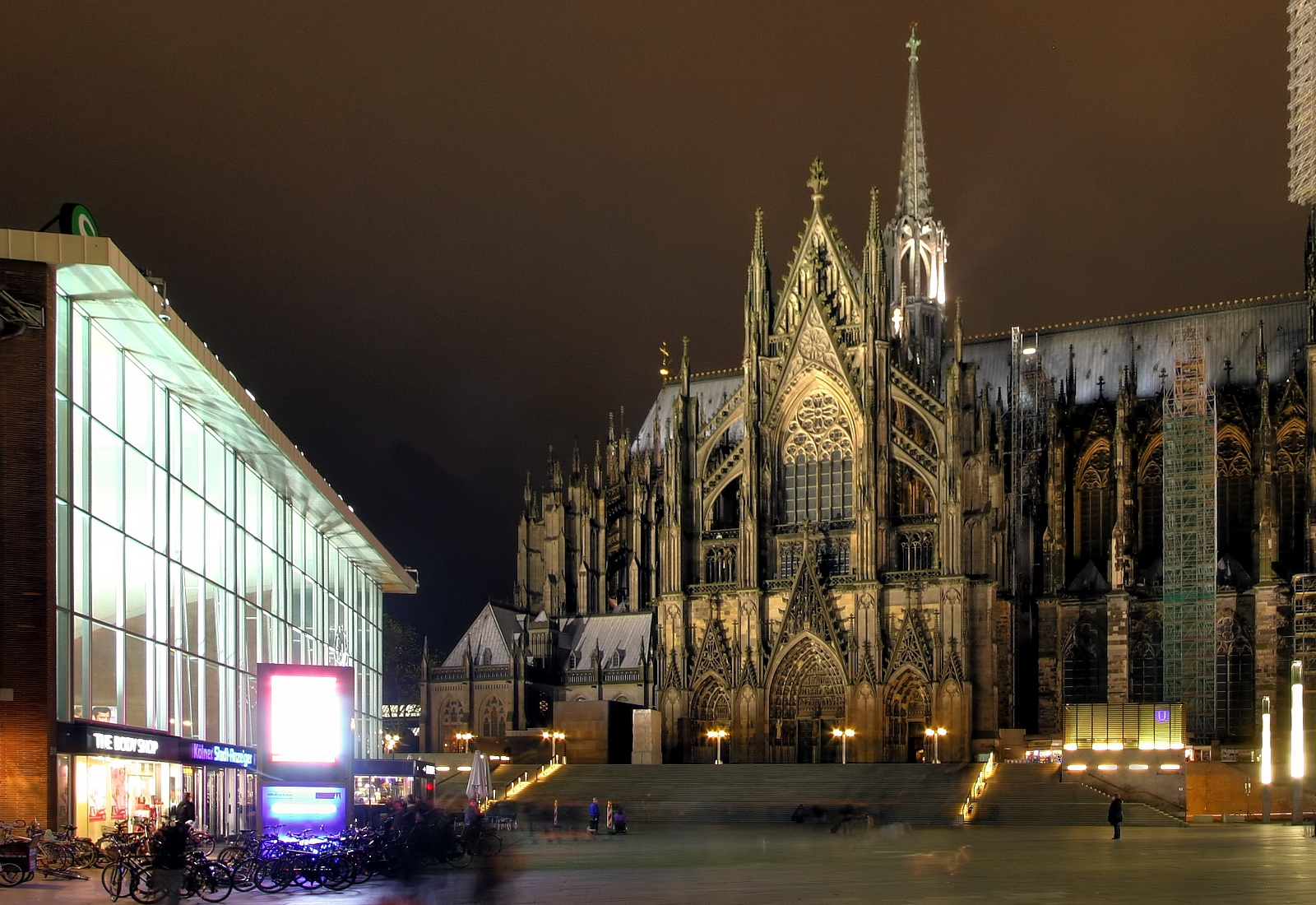 Kölner Dom Nordseite und Bahnhofsvorplatz bei Nacht